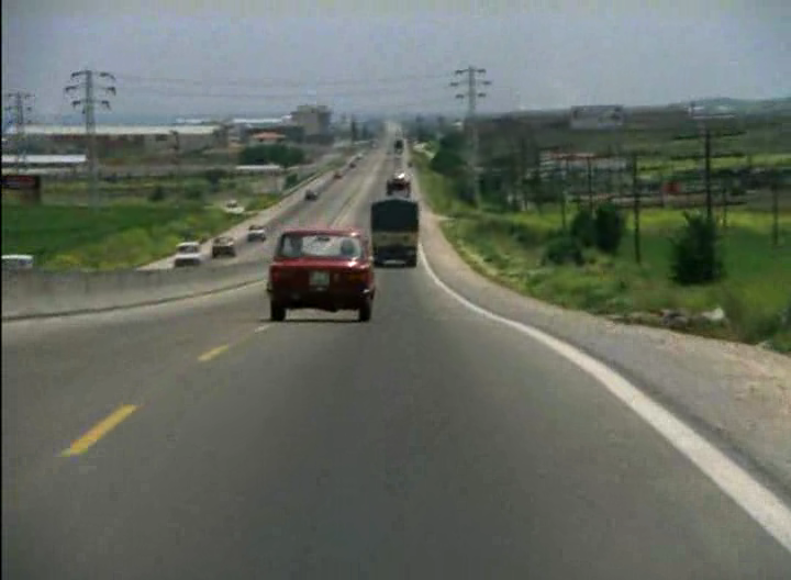 Carretera Nacional III a su entrada desdoblada en Madrid en 1973.